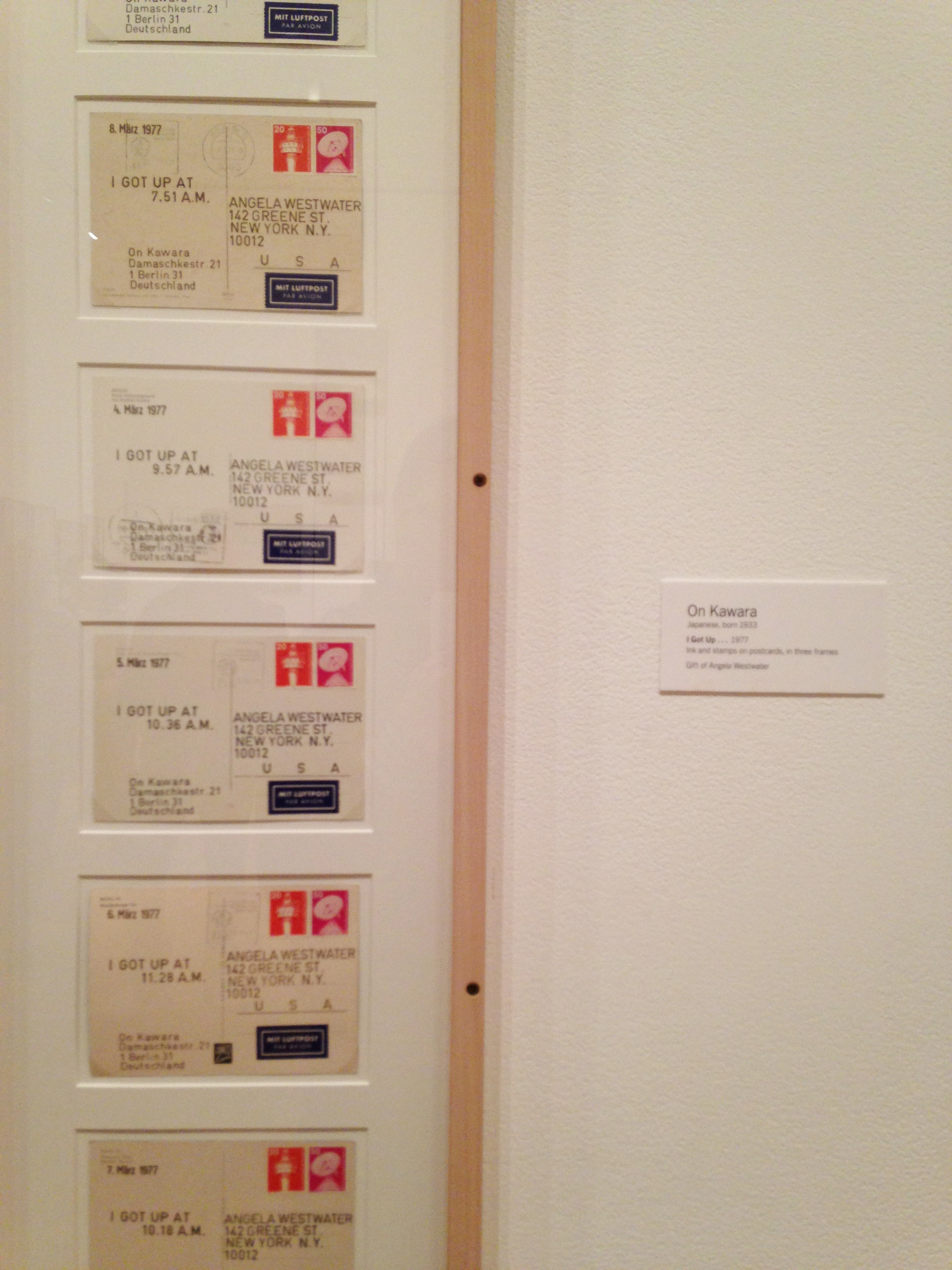 ผลงาน I got up ของคาวาระ